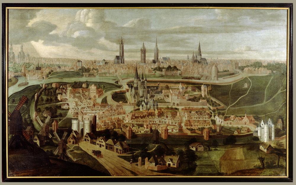 kopie naar Lukas De Heere, Gezicht op Gent; inv: 439